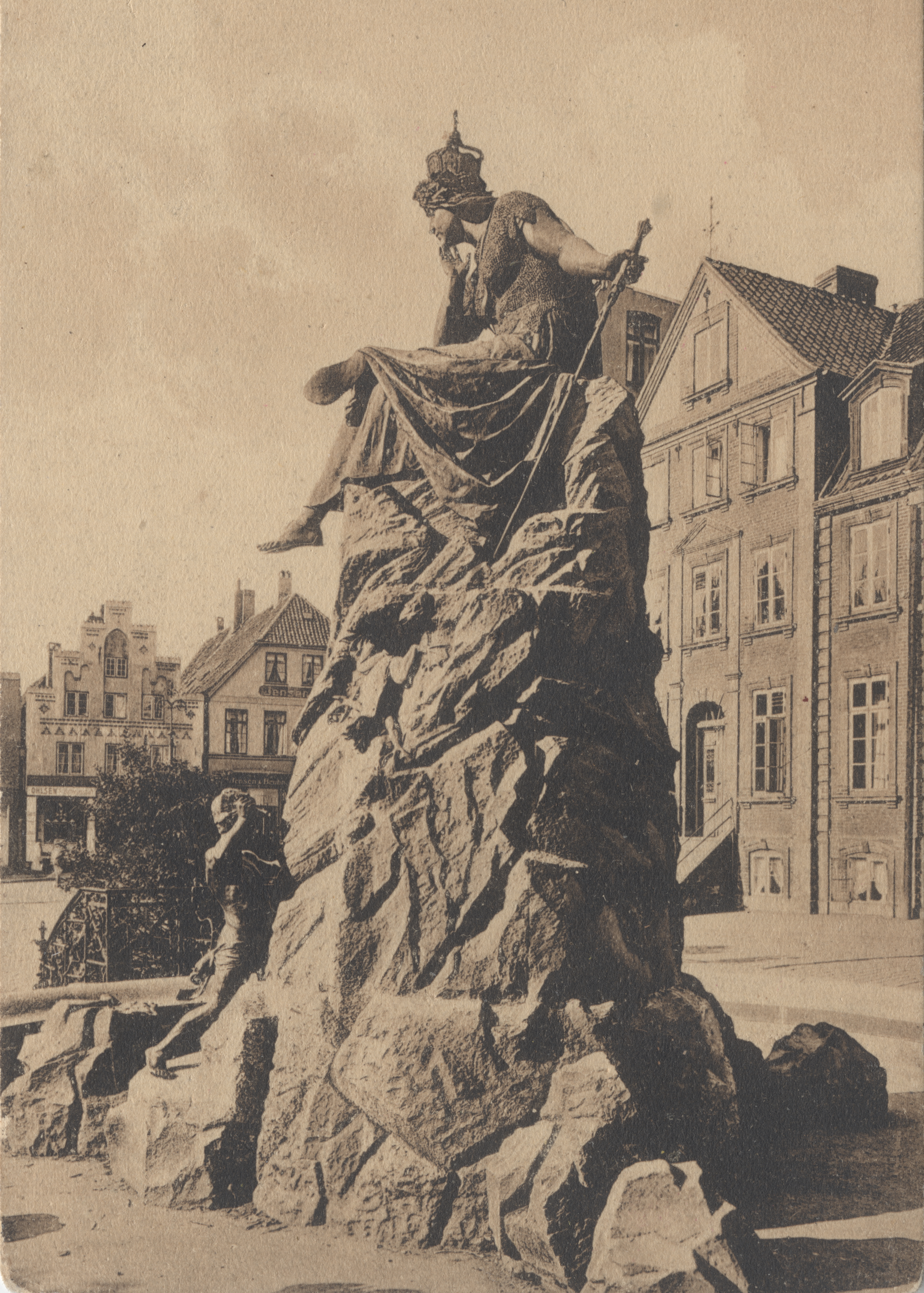 Foto Bismarckbrunnen von 1903 geerbt